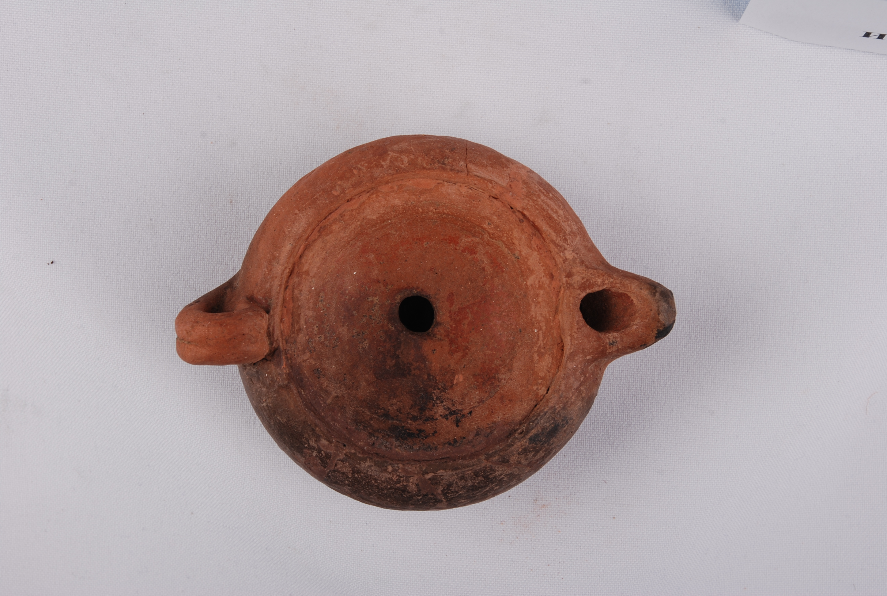 Srpski (latinica): Lampa od keramike iz perioda 2-4. vek. Pronađena iskopavanjima iz 2003. godine na lokalitetu Kamenitica u Maloj Kopašnici. Deo je antičke zbirke Narodnog muzeja u Leskovcu.